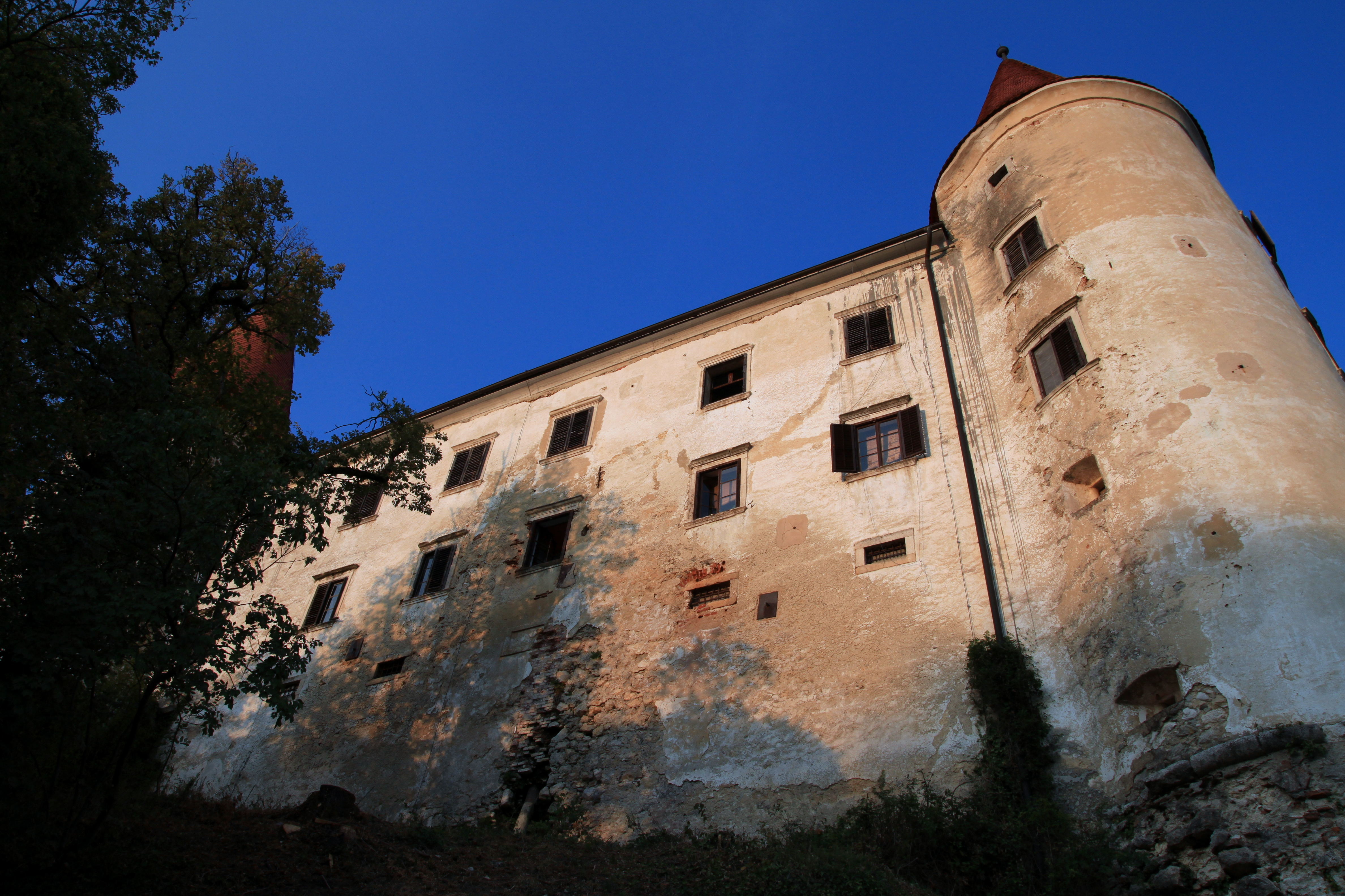 Bizeljsko